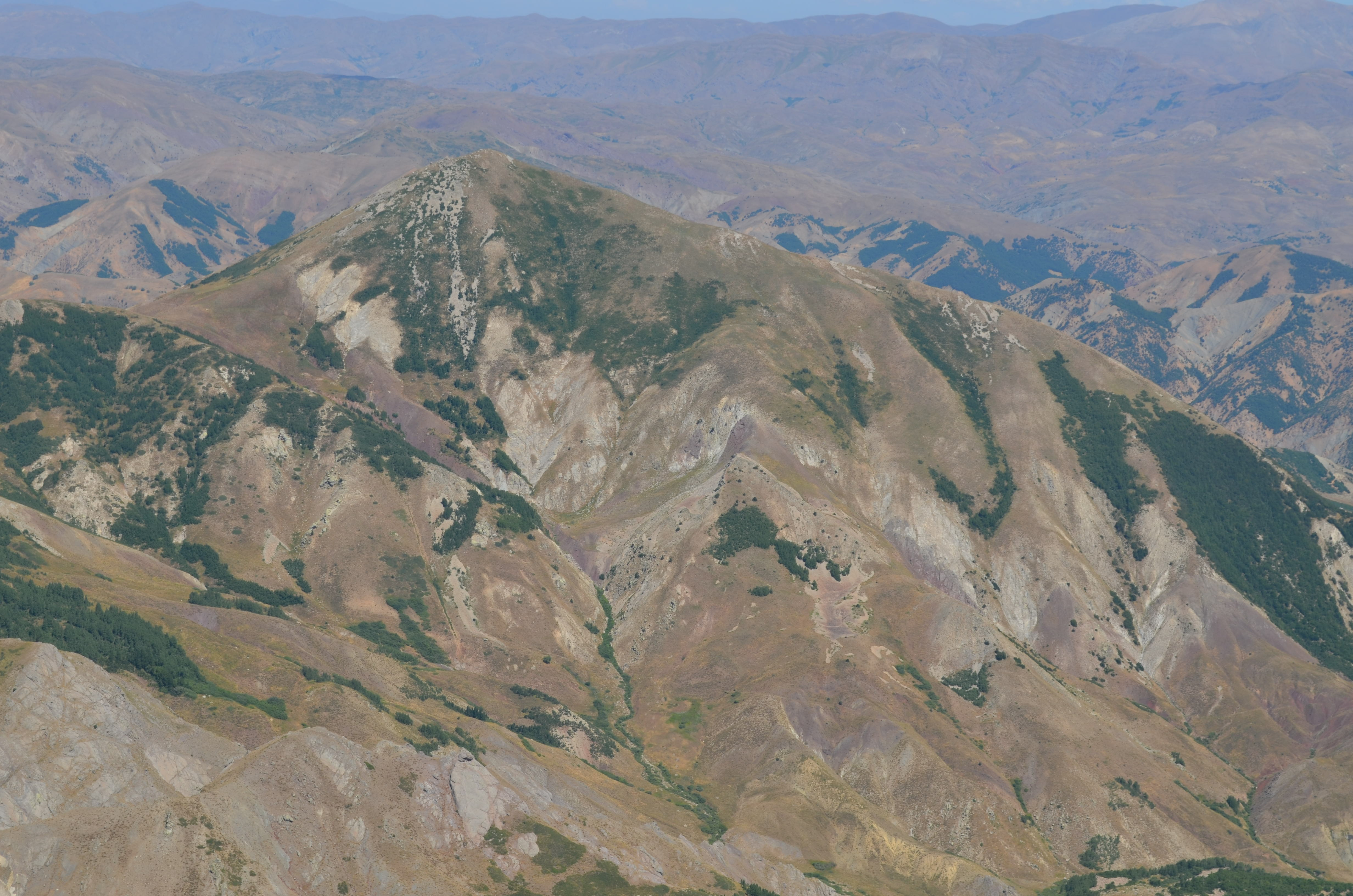 Çele dağının Sülbüs Dağı ndan görünümü